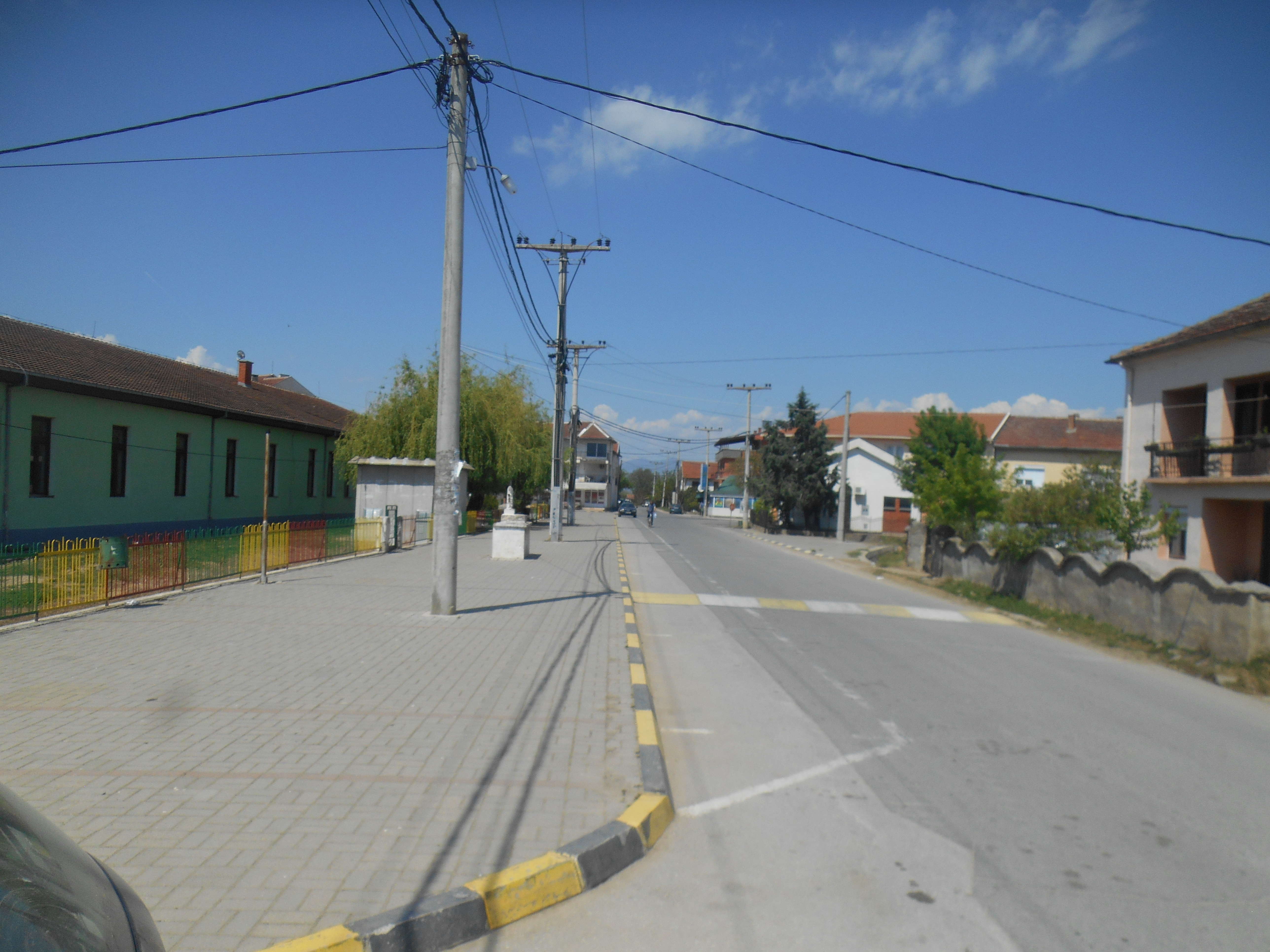 Босилово